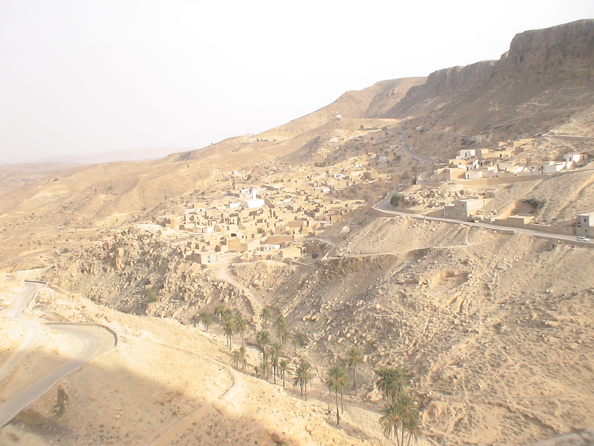 Village Toujane haut perché au sud de la Tunisie